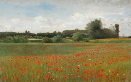 Campo di papaveri, ol/tela, cm 45.4 x 70, Collezione privata